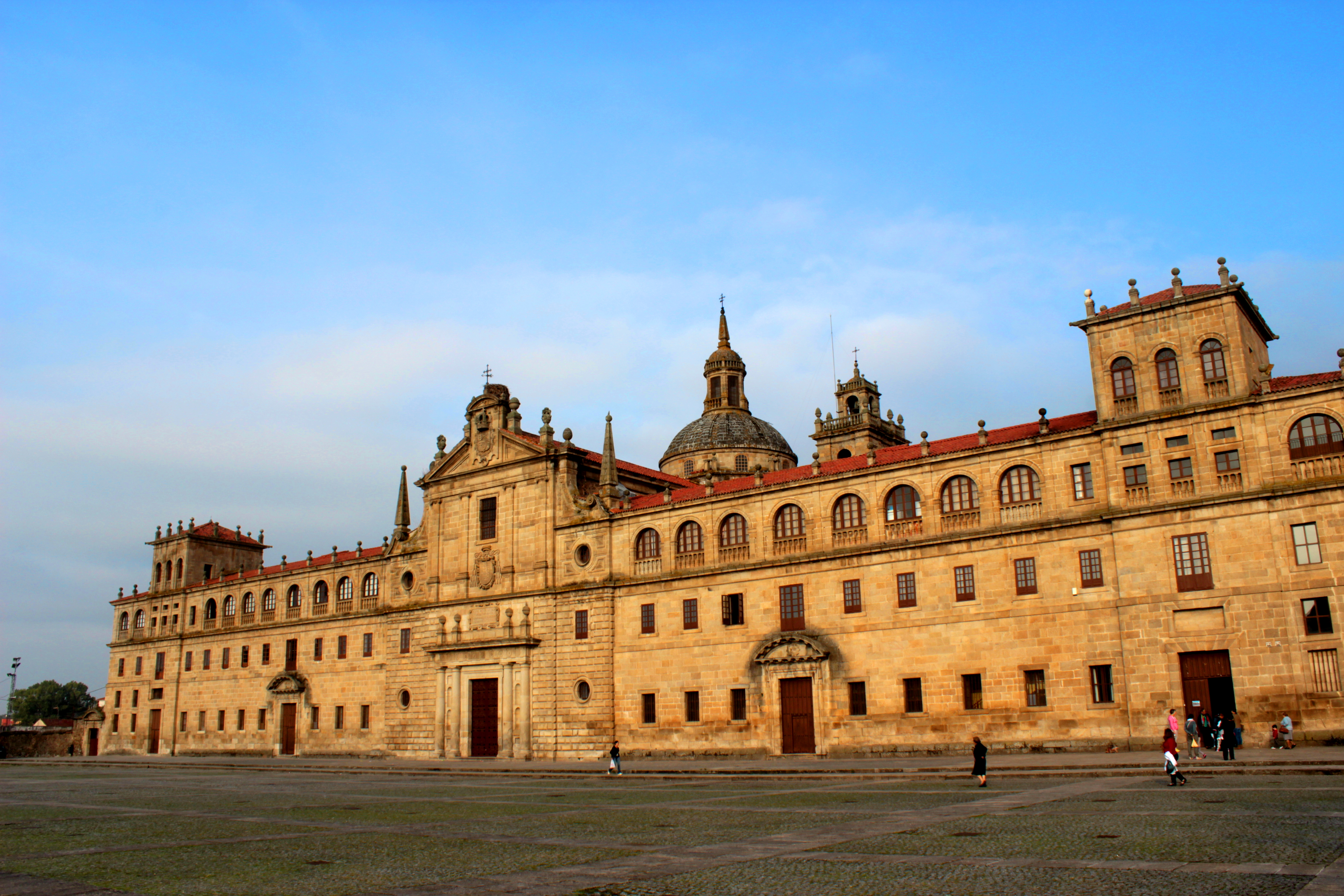 Monforte de Lemos